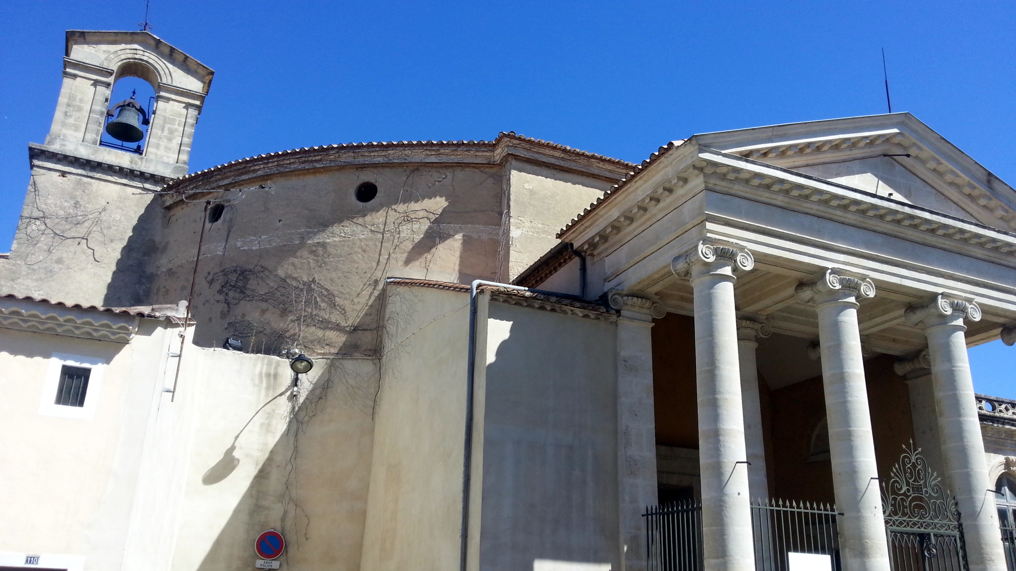 Temple protestant de Vauvert.